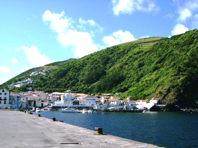 Porto das Velas, Baía, Ilha de São Jorge, Açores, Portugal